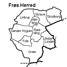 Frøs Herred, Haderslev Amt, Danmark.